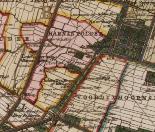 Harnaschpolder.